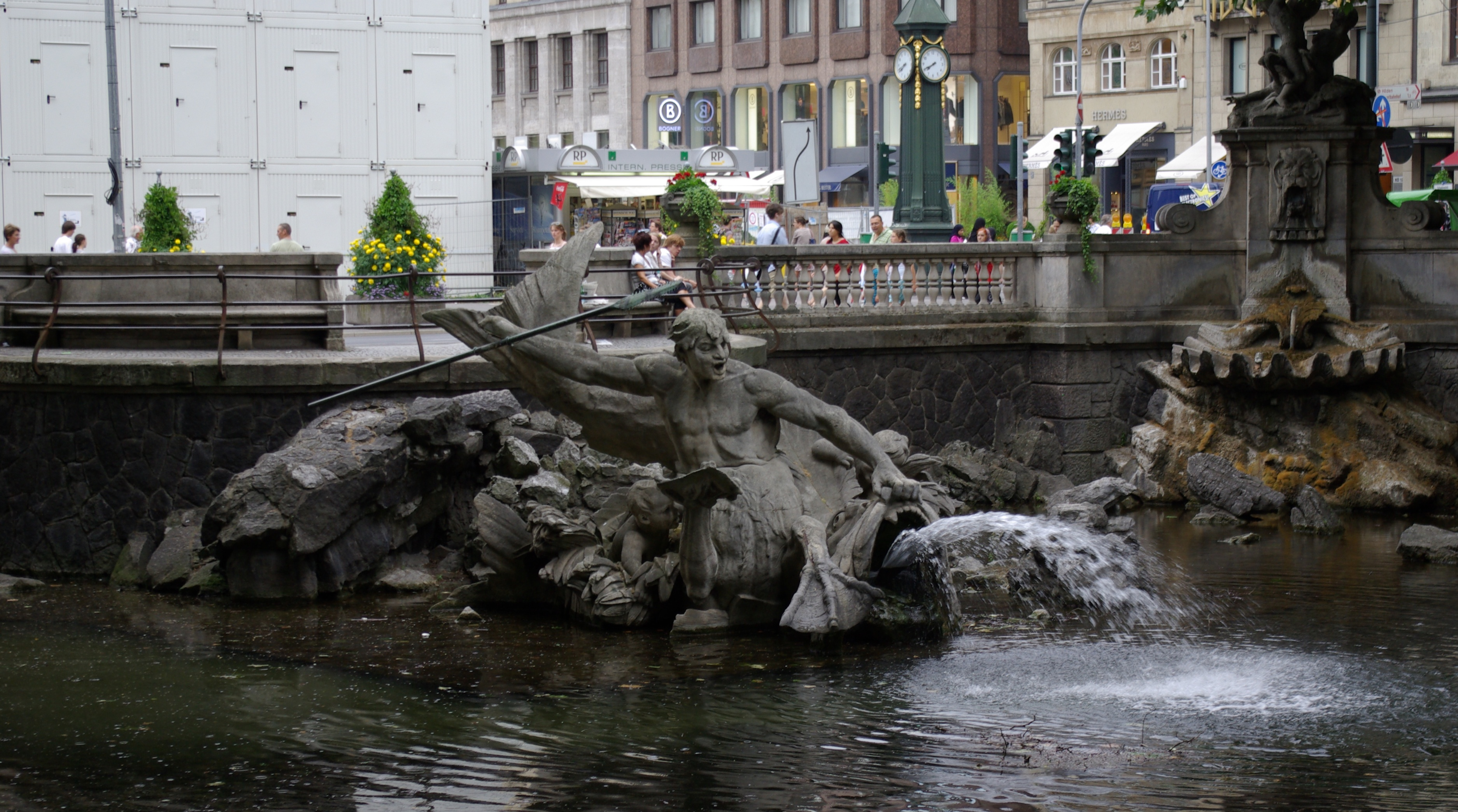 Tritonenbrunnen auf der Düsseldorfer Königsallee. Wegen durch Bauarbeiten verursachter Schäden an der Wasserzufuhr sprudelt das Wasser nur mit halber Kraft.